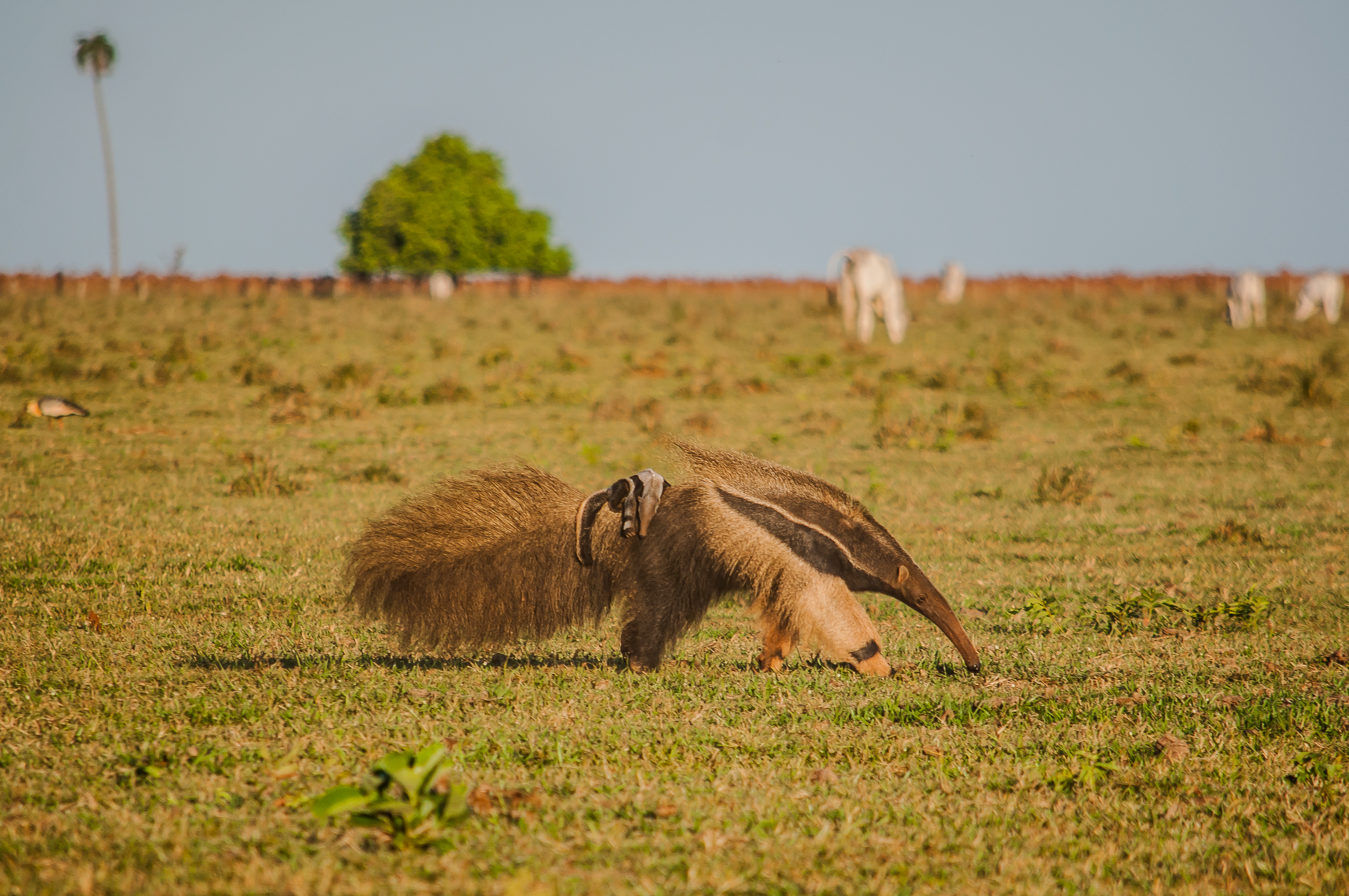 Tamanduá-bandeira com filhote, em fazenda na área rural de Campo Grande - MS.